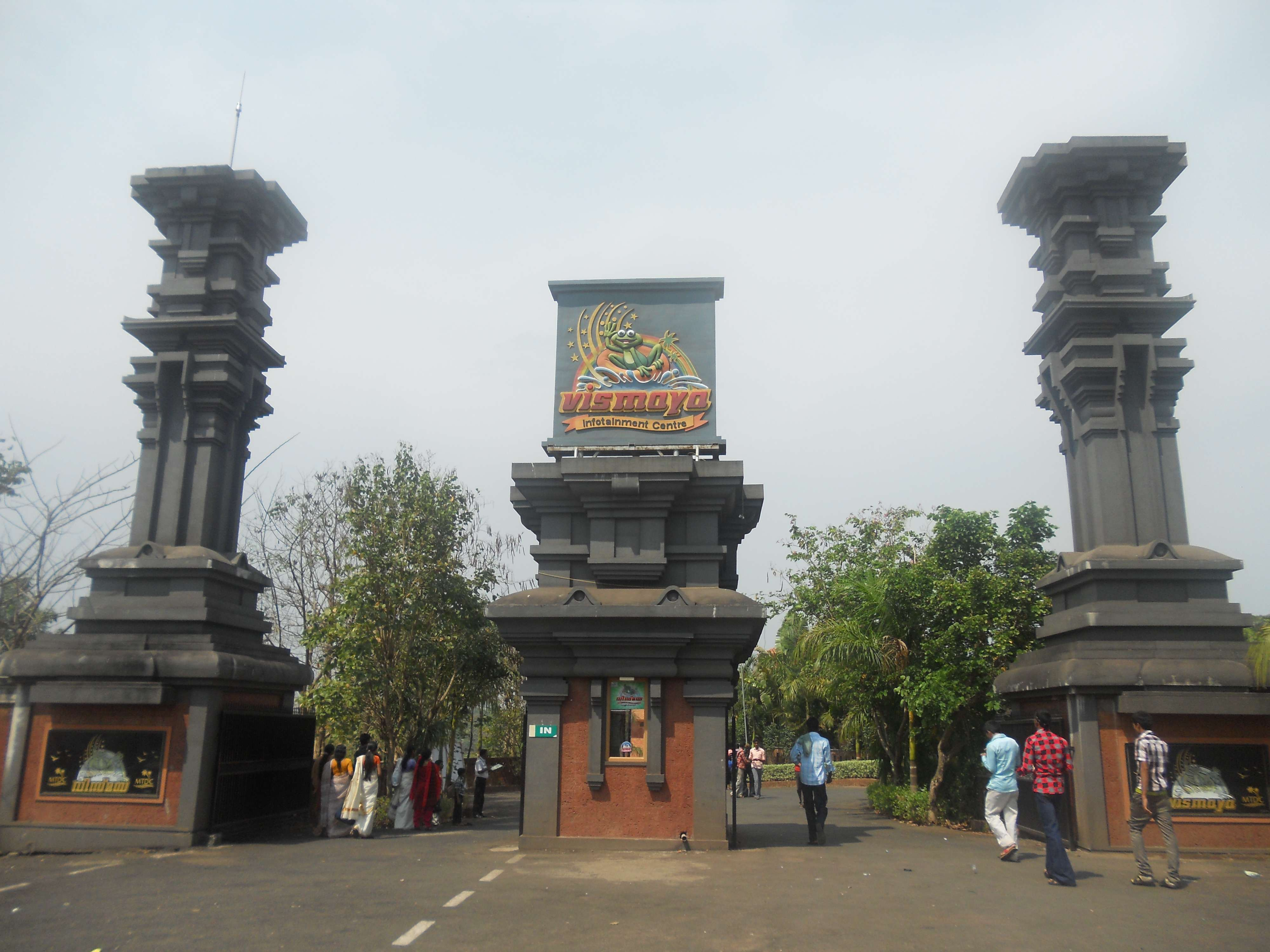 പറശ്ശിനിക്കടവു് വിസ്മയ പാർക്കിന്റെ പ്രവേശനകവാടം